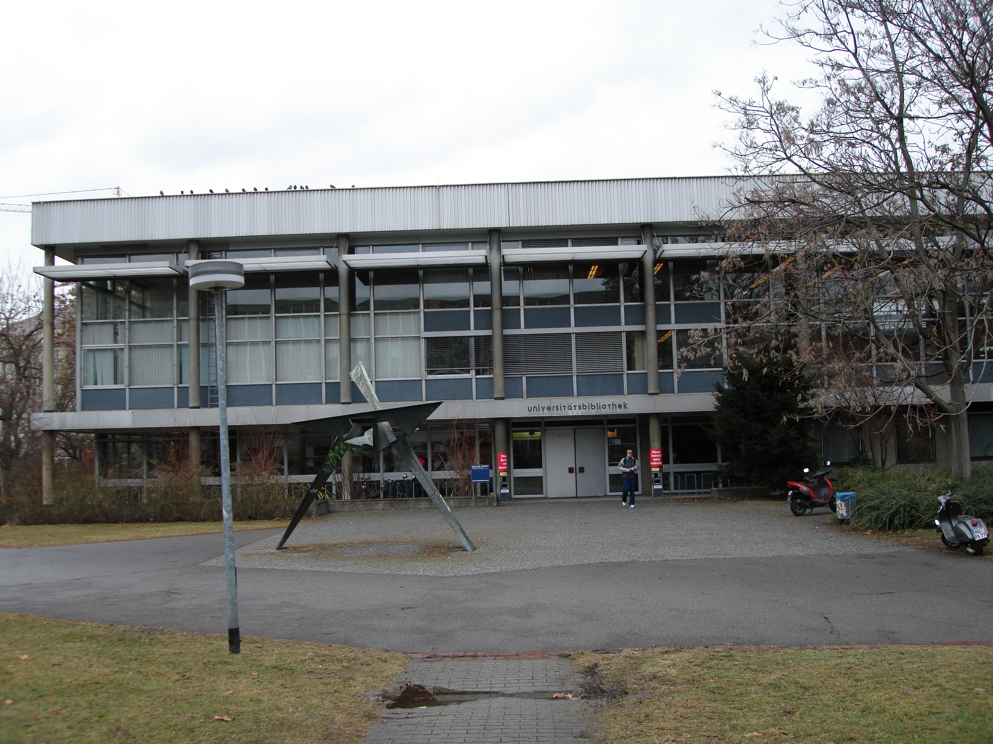 Universitätsbibliothek, Universität Stuttgart mit Agression I (1961) von Hans Uhlmann